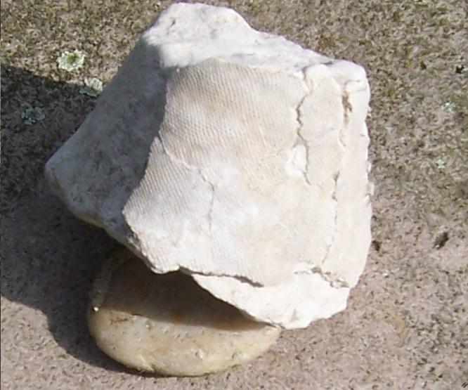 Fossiler Schwamm von der "Strasse der Seeigel" (B474) bei Rosendahl-Holtwick, NRW, Germany. Gefunden im Oktober 2015.